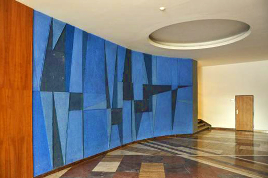 Bohumír Matal,1959, mural on the ground floor of an office building BVV Brno Trade Fair.